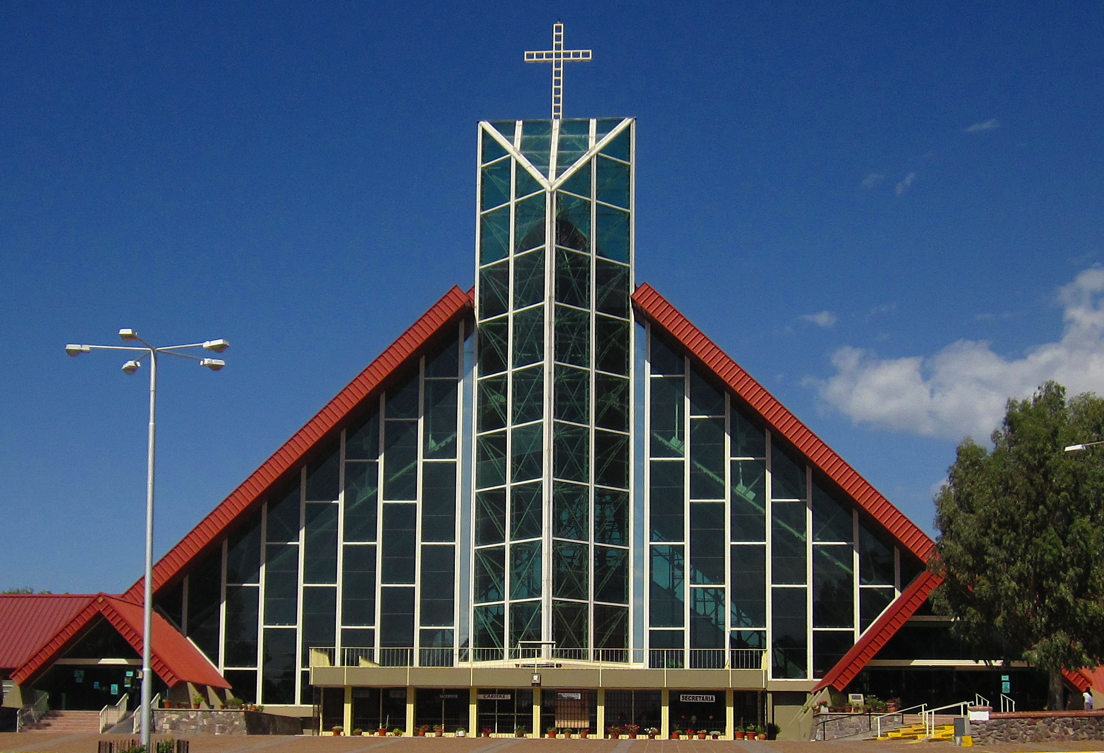 Iglesia de cristal Nuestra Señora de Lourdes de El Challao, Las Heras, Mendoza.